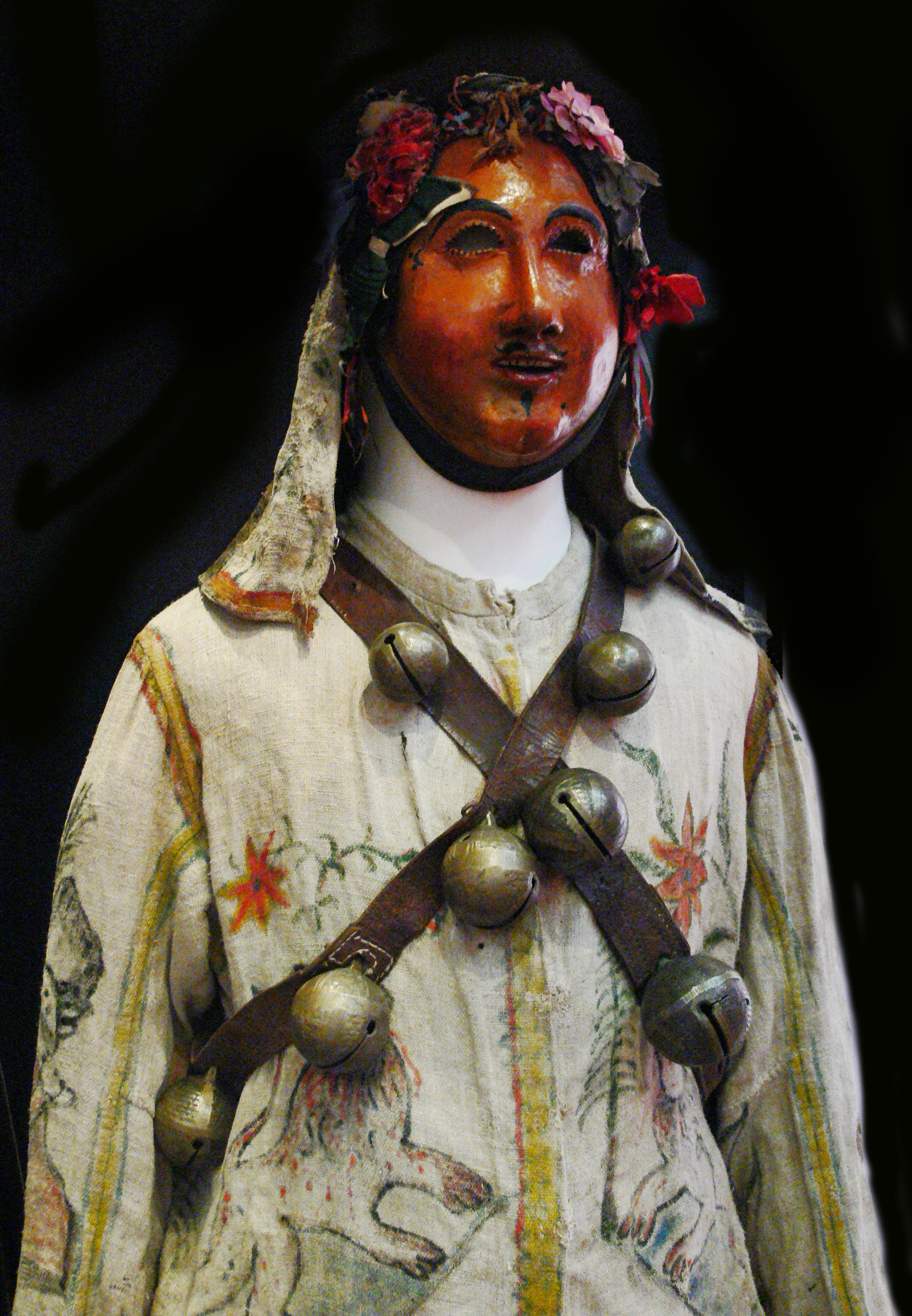 Fasnetsfigur Hansel, Donaueschingen (20. Jh.) Gallery: Reiss-Engelhorn-Museen, Mannheim